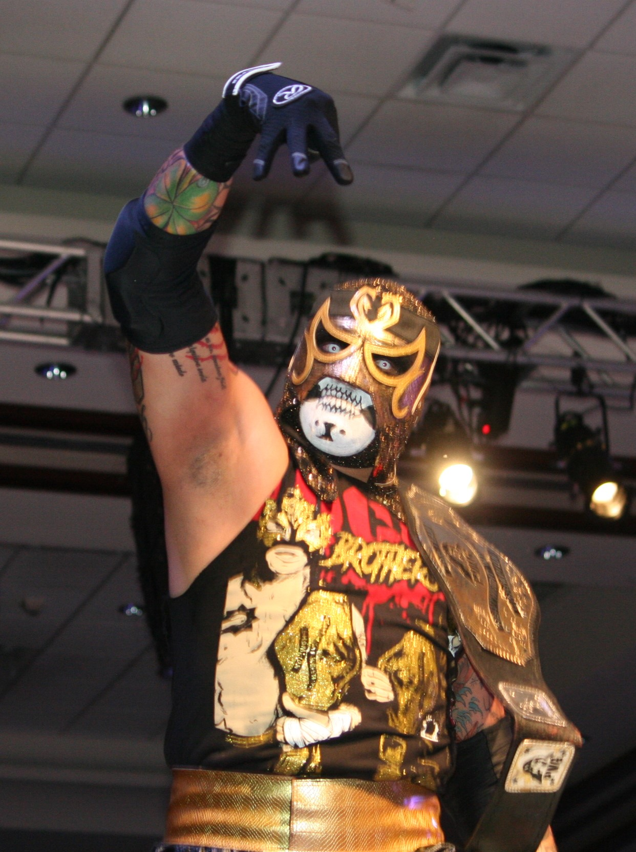 Pentagon Jr. avec la ceinture de champion du monde par équipes de la Pro Wrestling Guerrilla.